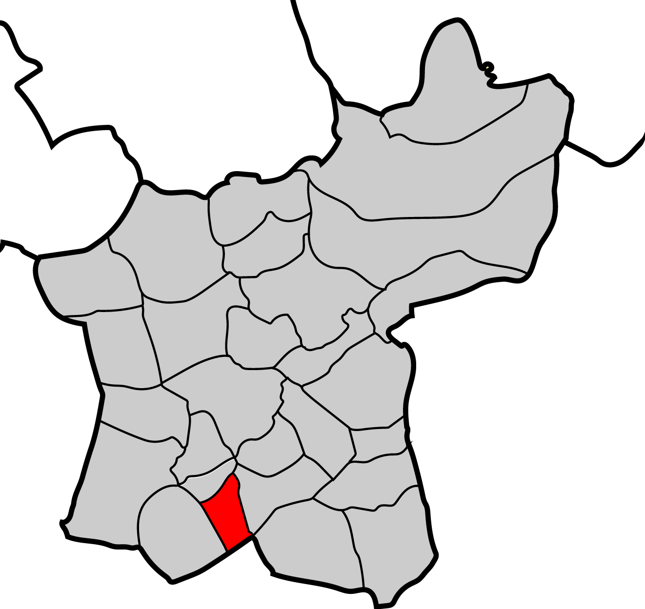 Mapa parroquia de Francos Baralla